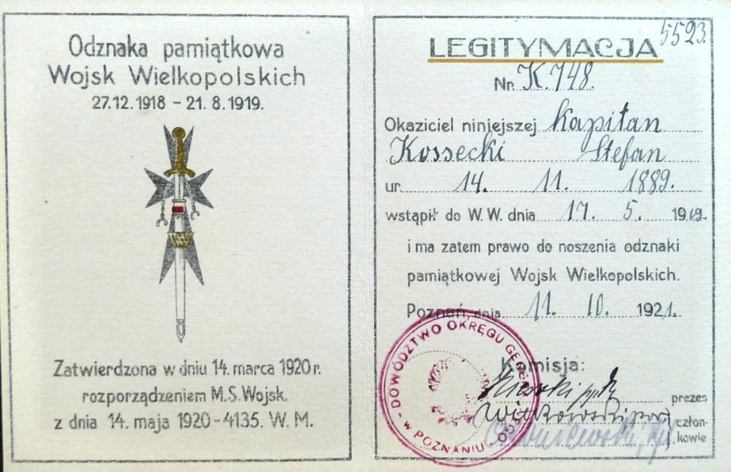 Legitymacja odznaki pamiątkowej Wojsk Wielkopolskich kpt. Stefana Kosseckiego wyd. 11.10.1921 r.